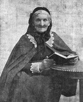 Marija Michajlovna Dondukova-Korsakova (1827-1909)